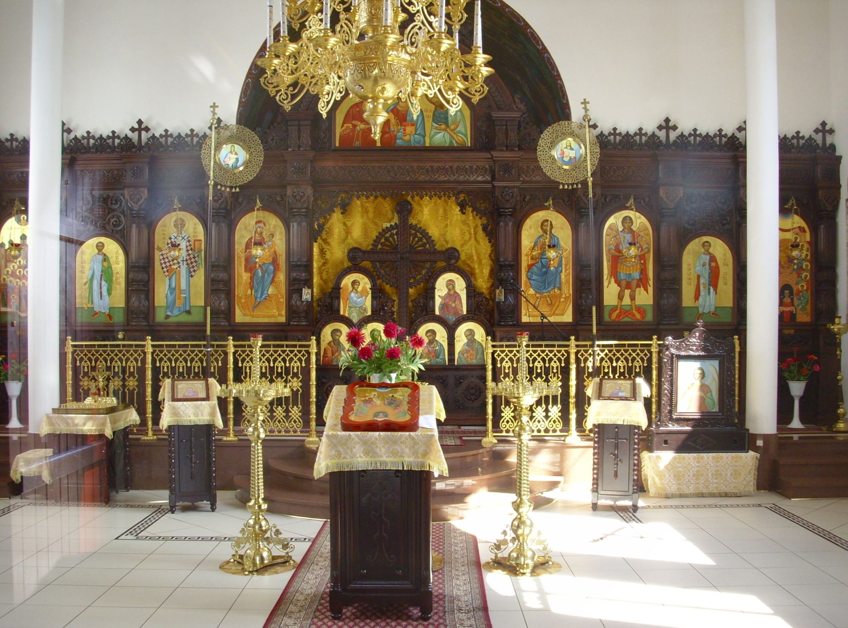 Kodeń. Wnętrze nowej cerkwi.